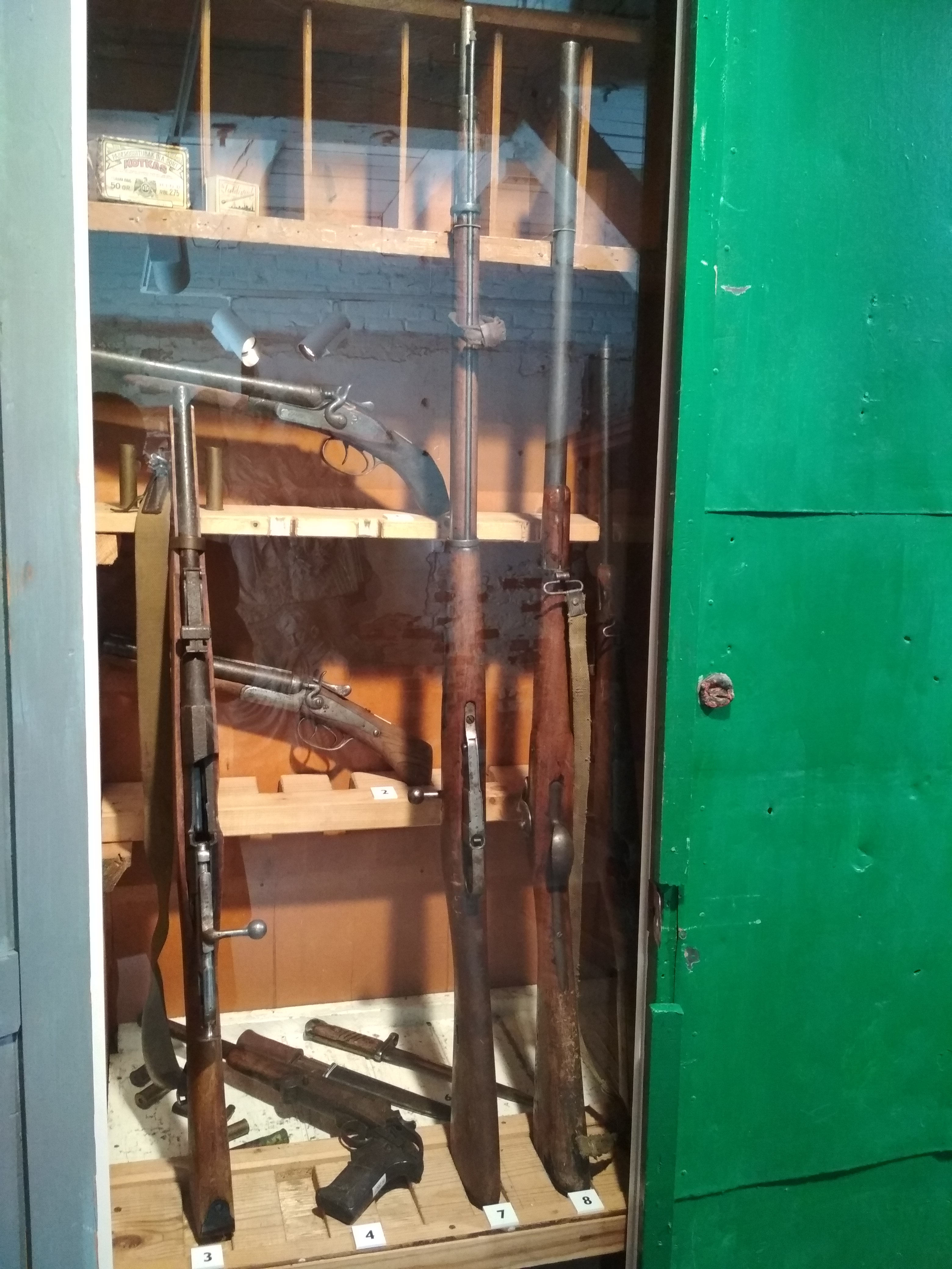 Valik metsavendade relvi (Pärnu muuseum)